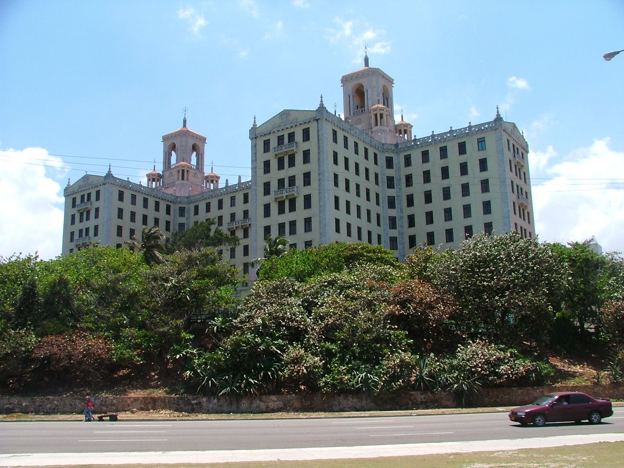 El Hotel Nacional de Cuba está catalogado como el hotel más famoso y prestigioso de la isla. Se encuentra situado en el corazón del Vedado, la zona más céntrica de la Ciudad de La Habana, sobre una colina a pocos metros sobre el nivel del mar. Sus vistas únicas ofrecen un hermoso y variado panorama de la ciudad, entre las que se pueden admirar, la bahía habanera con su clásico Malecón y la ancestral fortaleza del Morro.